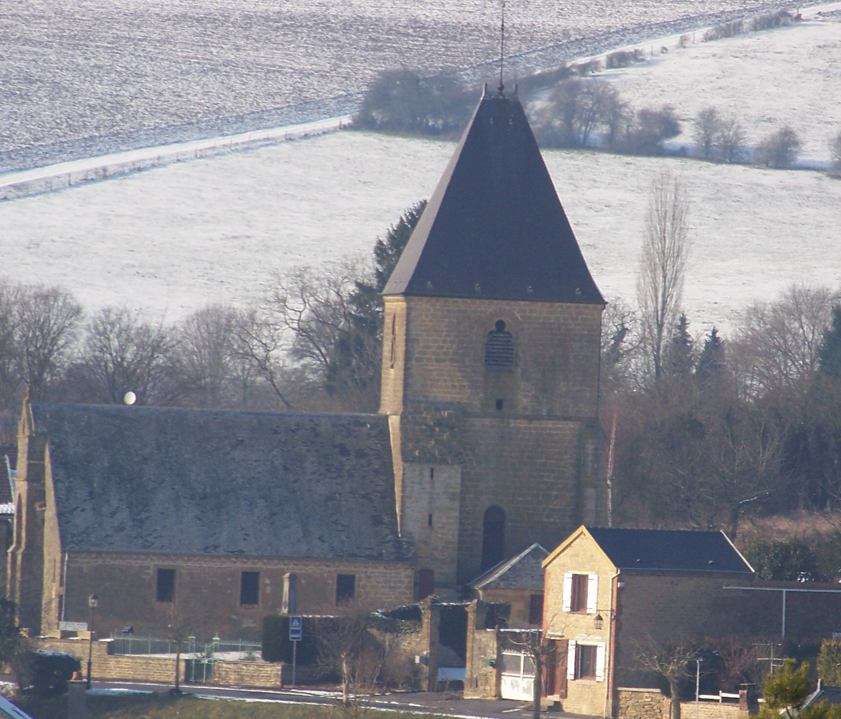 l'église de Cheveuges